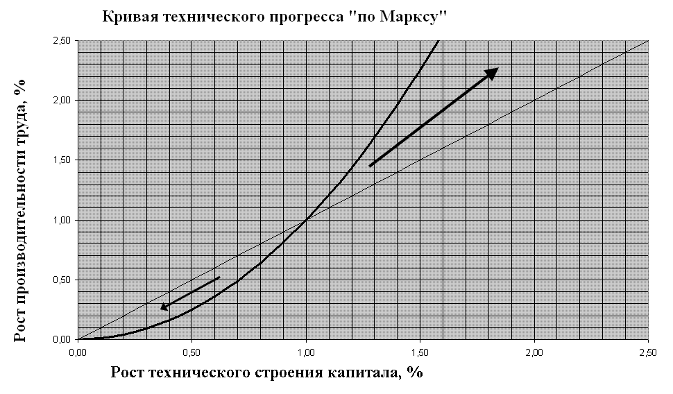 График технического прогресса